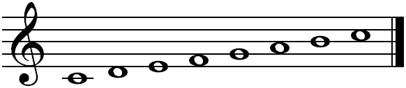 koobak See also : Image:Gamme do majeur clef sol.png, Image:C major scale.png, Image:Gamme do majeur.mid